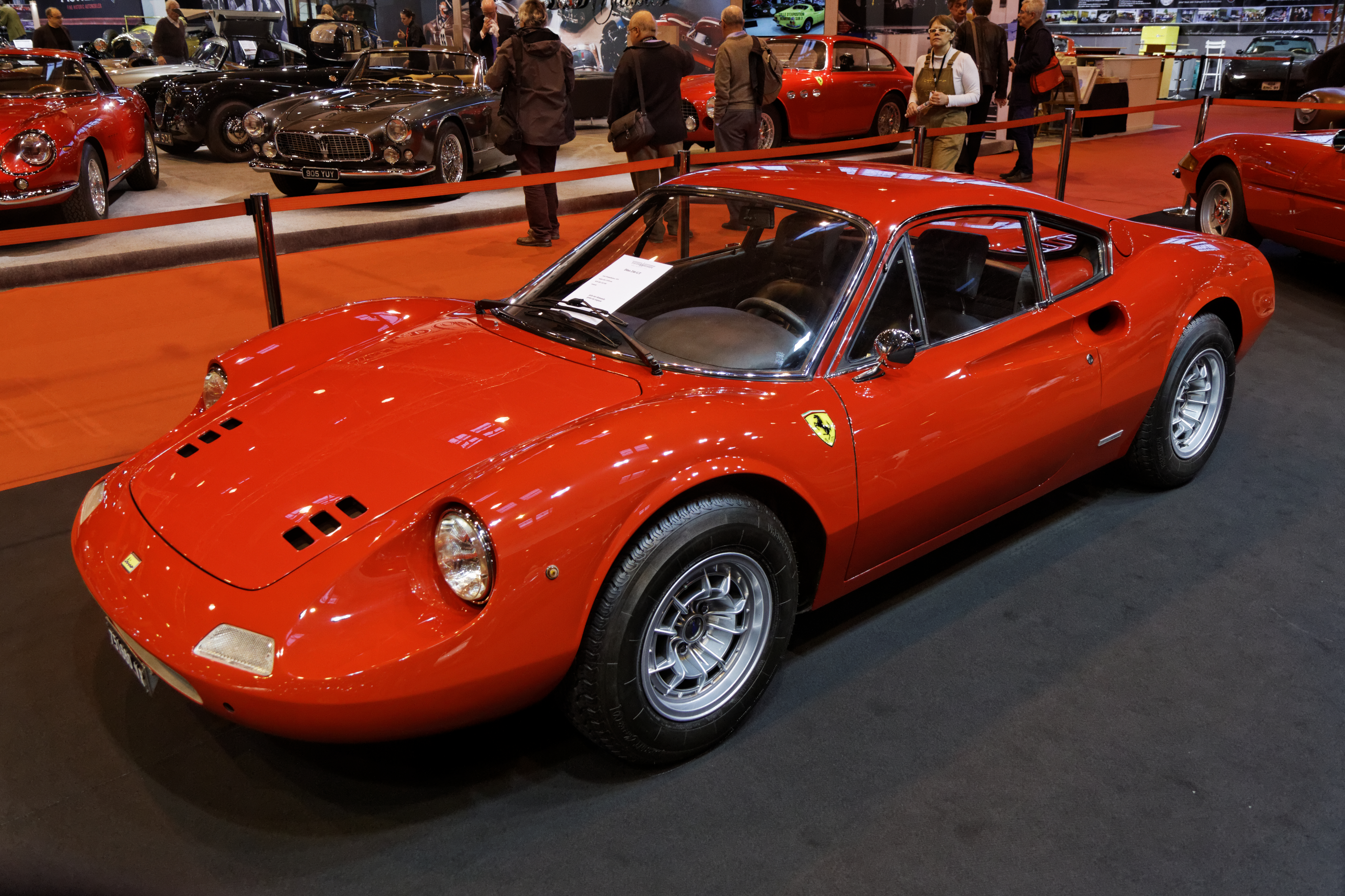 Une Ferrari Dino 246 GT présentée lors du salon Retromobile 2014.